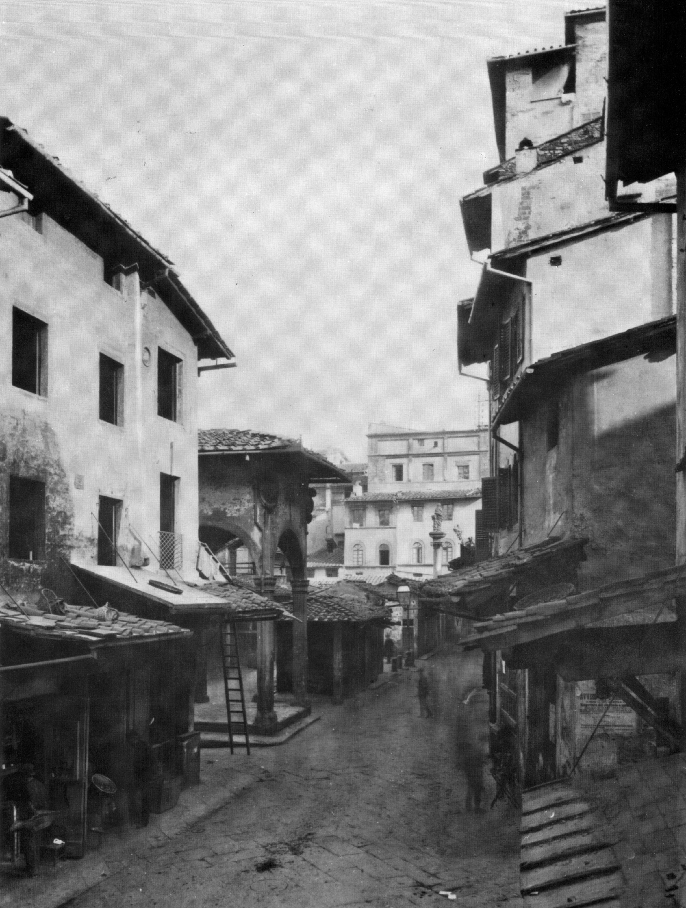 Mercato vecchio before 1881